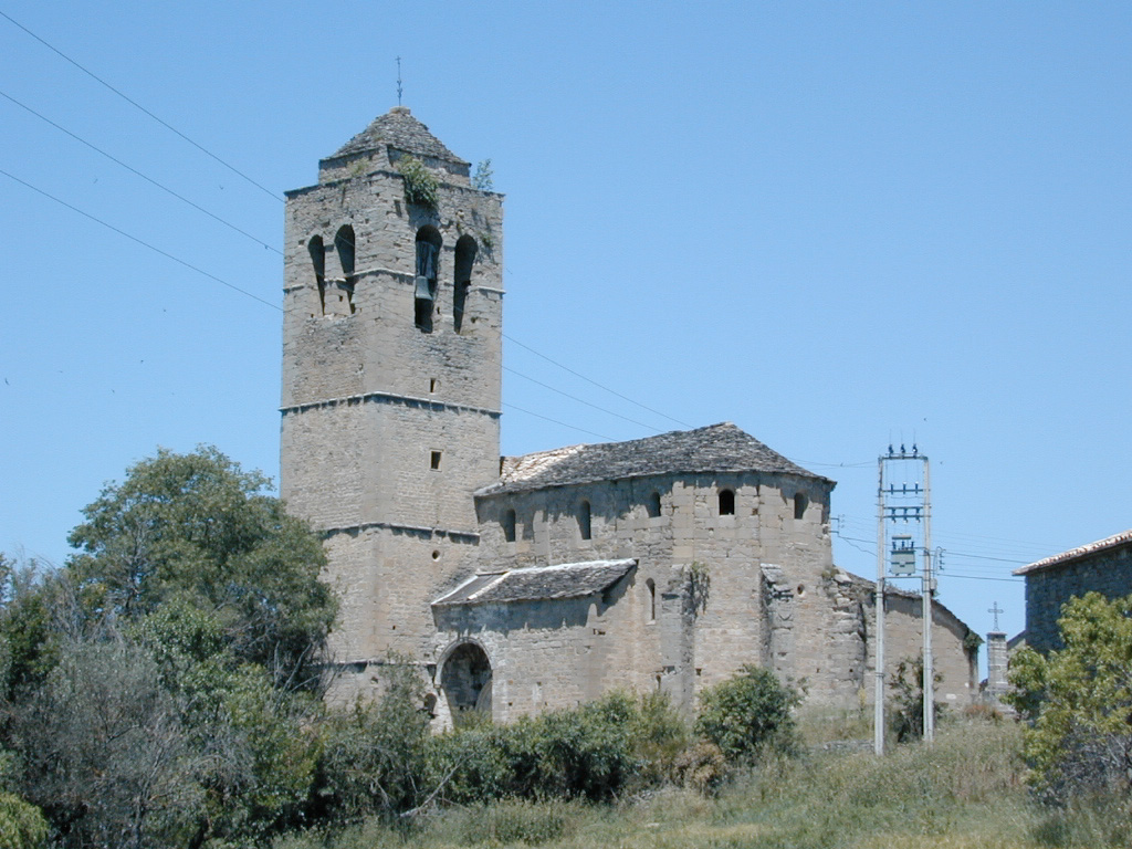 Vista NE de la iglesia de Castejón de Sobrarbe